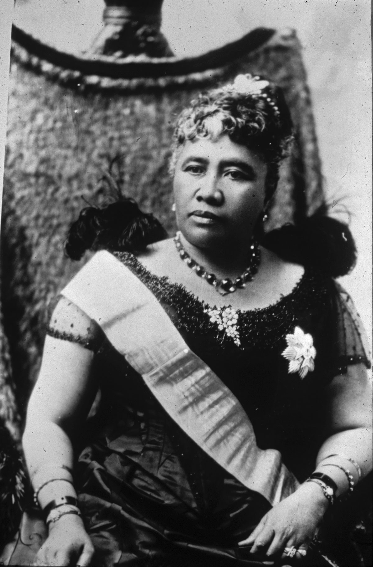 Queen Liliuokalani Licensing